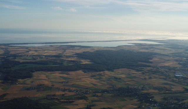 Jamno - jezioro na Wybrzeżu Słowińskim, widok z lotu ptaka